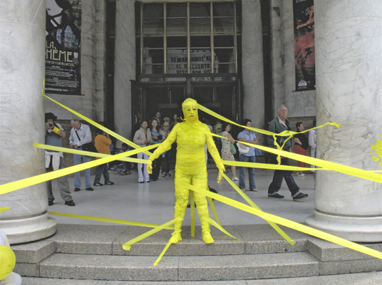 Personaje amarrado a las columnas del Palacio de Bellas ArtesFotografía del Performance AMARILLO realizado en el año 2006 en apoyo a Andres Manuel López Obrador